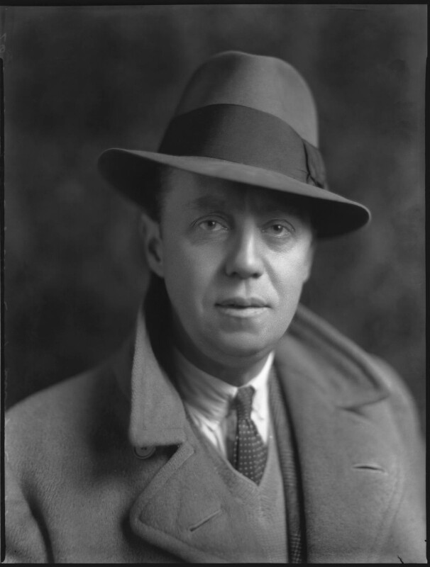 Lord Liverpool